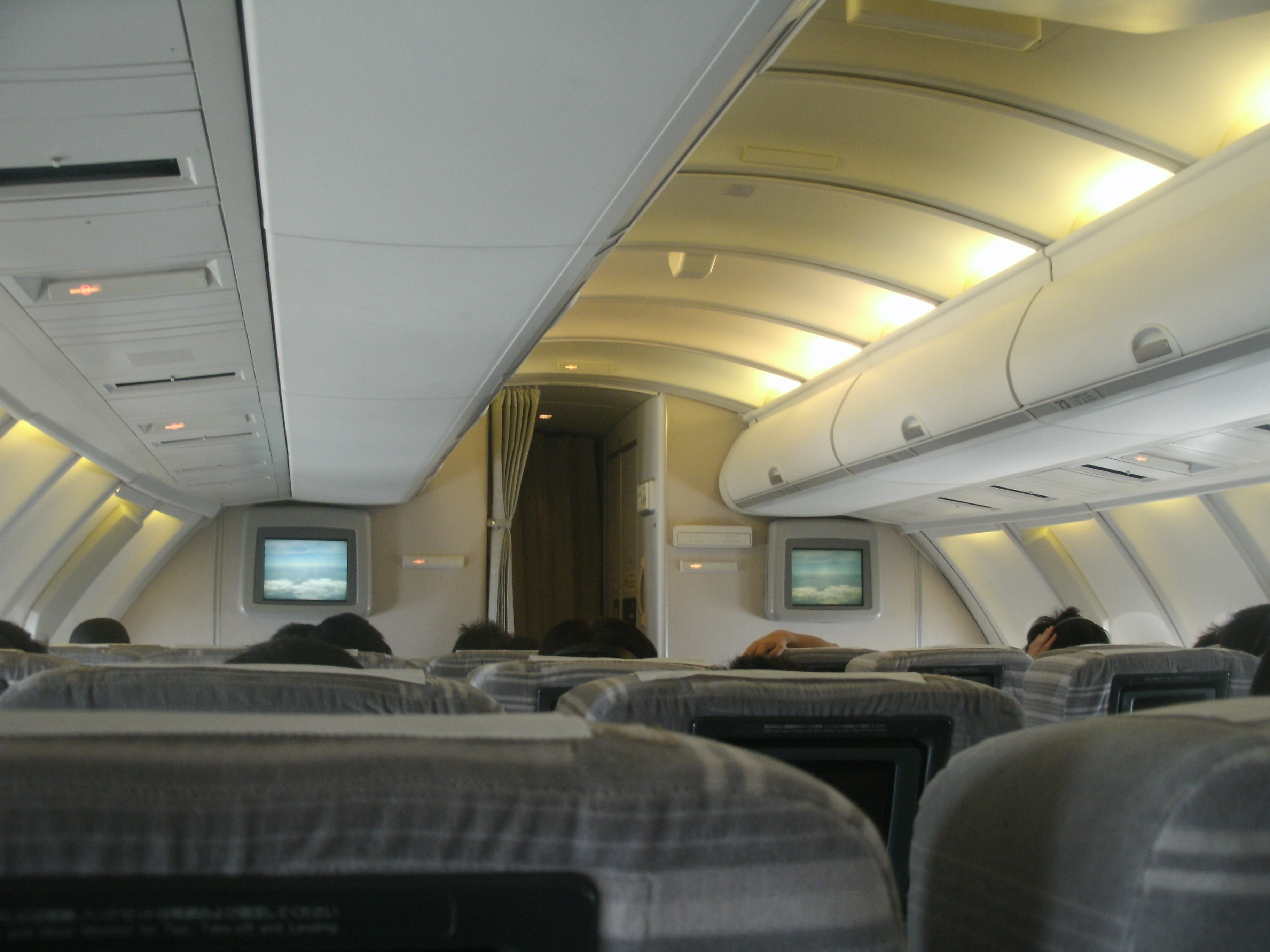 日本航空の2階席